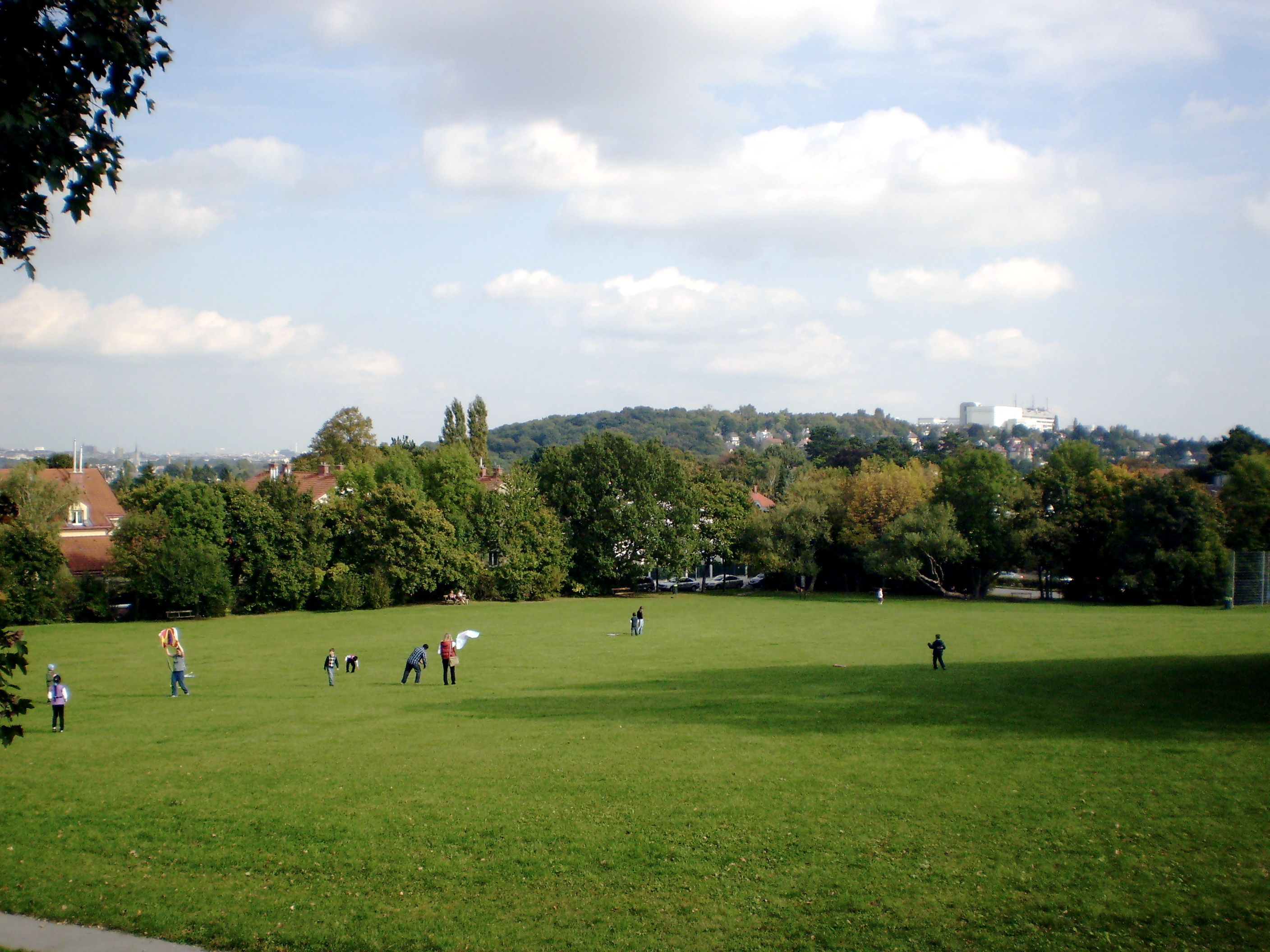 Blick vom Roten Berg Richtung Südost auf den Küniglberg mit ORF-Zentrum im 13. Wiener Gemeindebezirk Hietzing. Drachensteigen bei Nordwestwind.